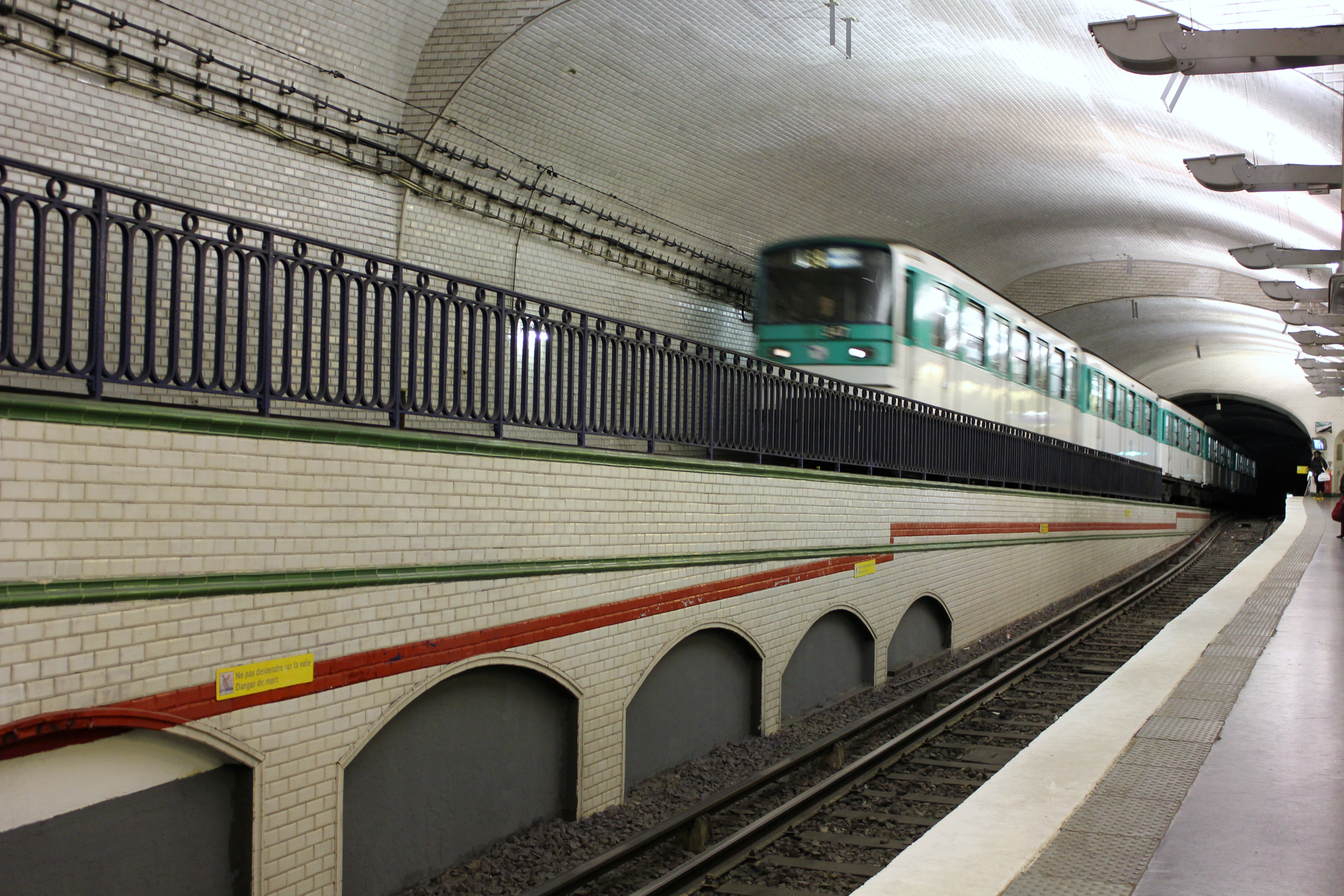 Paris Metro Linie 10 Mirabeau Blick Richtung Gare d'Austerlitz mit Zug